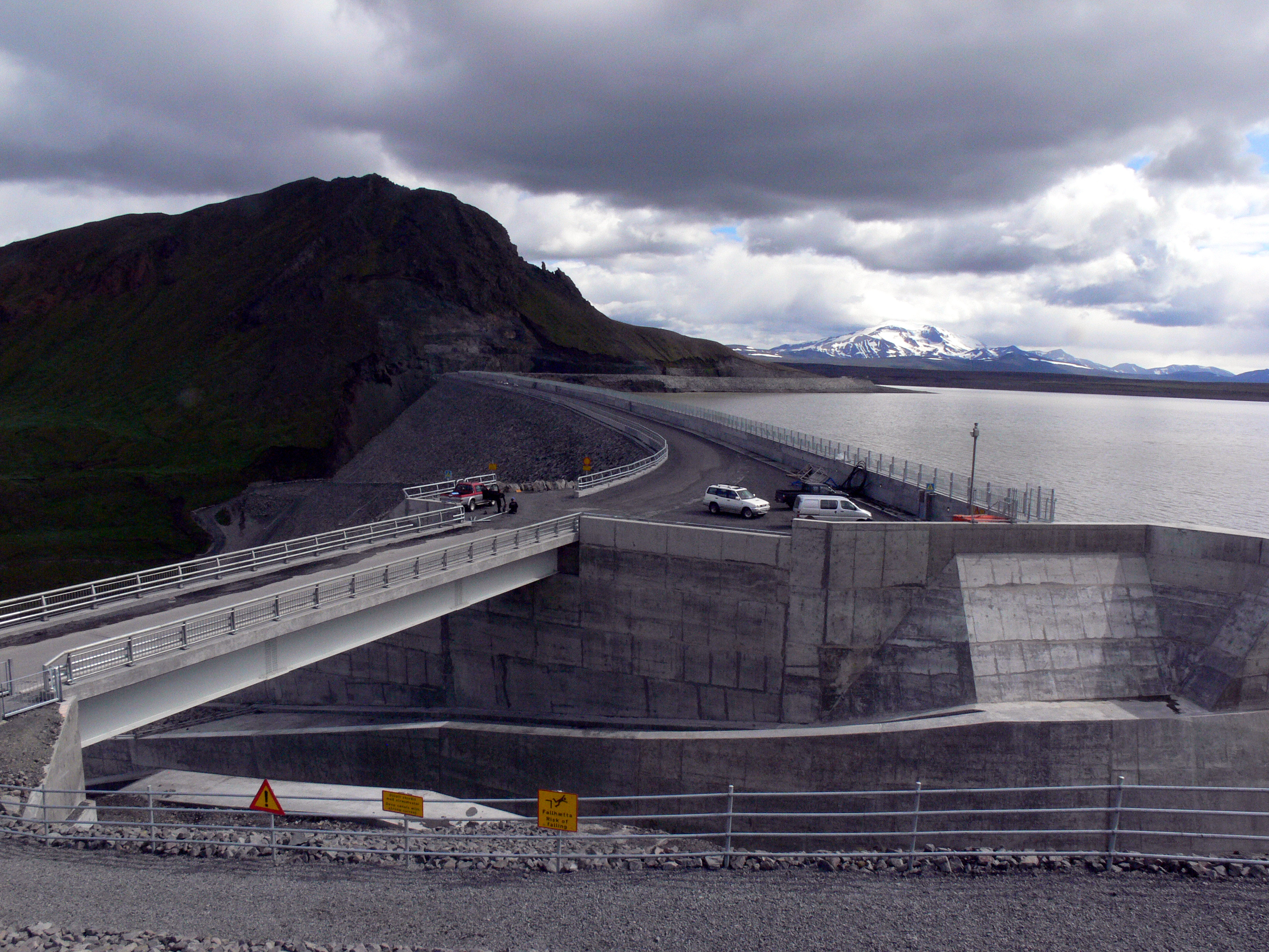 Der Staudamm.